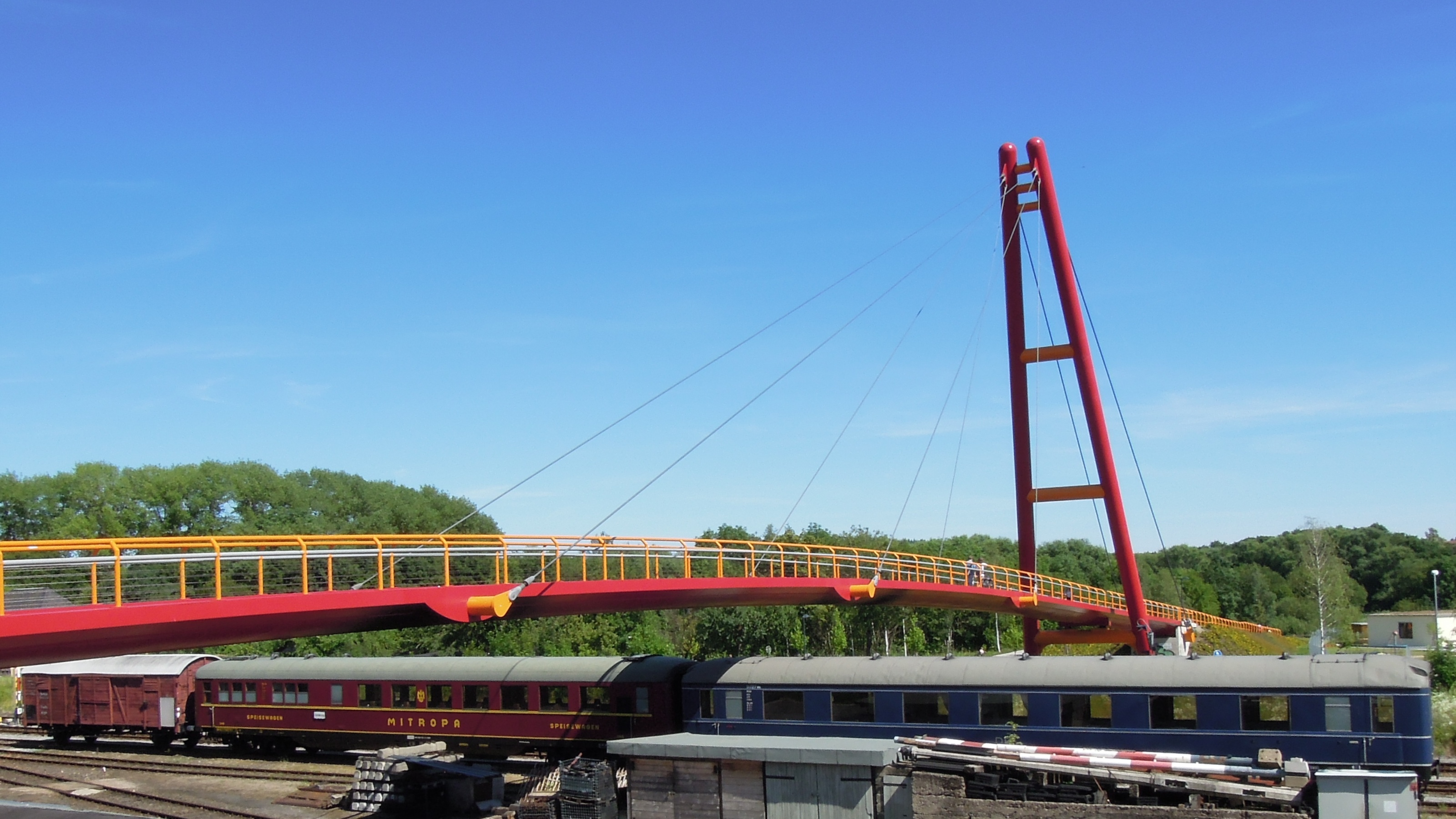 Fuß- und Radwegbrücke über den Bahnhof Ilmenau aus Richtung Südwesten